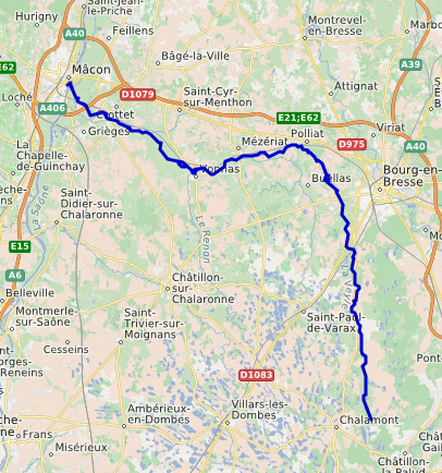 carte réalisée sur umap This map may be incomplete, and may contain errors. Don't rely solely on it for navigation.